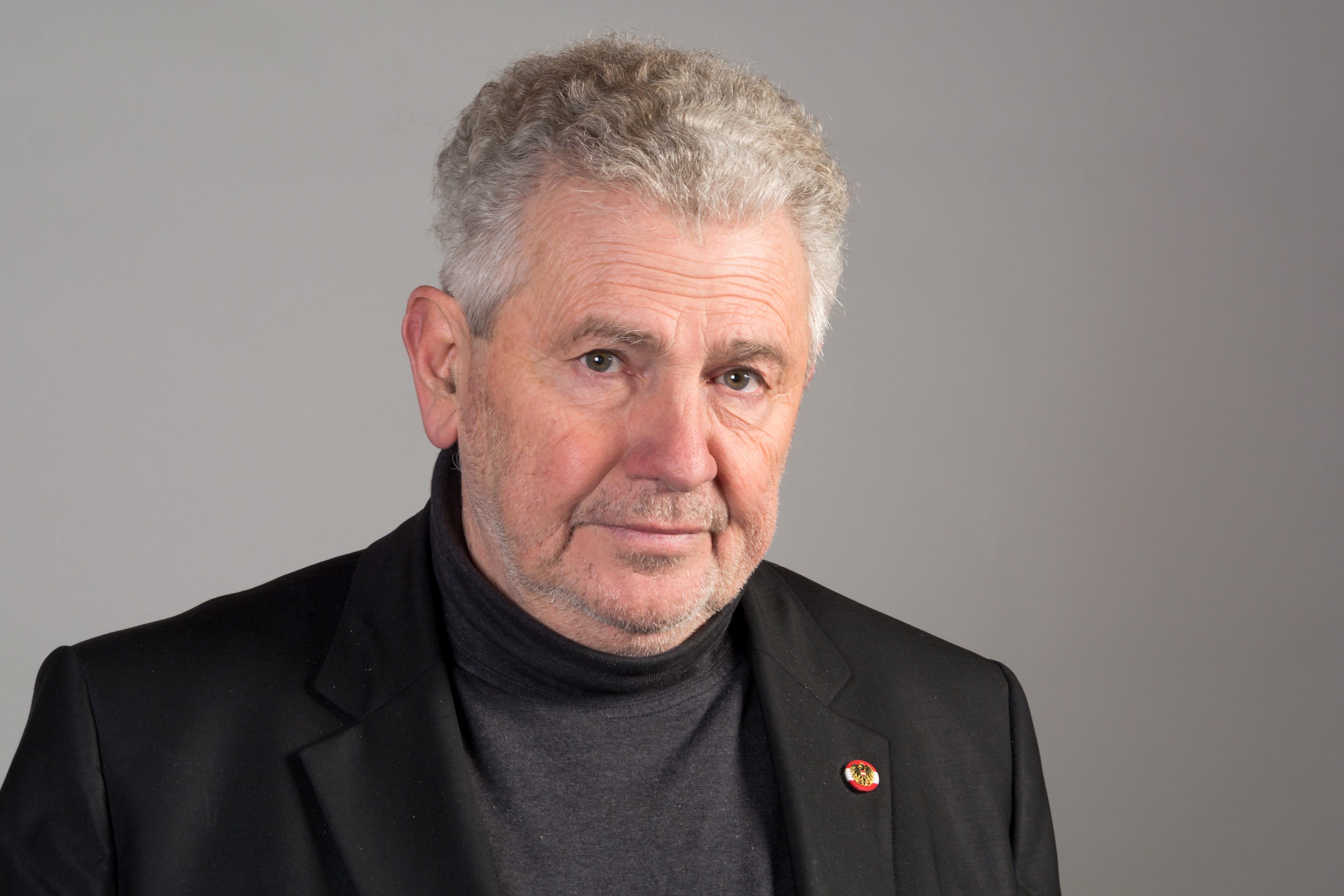 Andreas Mölzer, Österreich, 2014 Mitglied des Europäischen Parlaments (MEP)